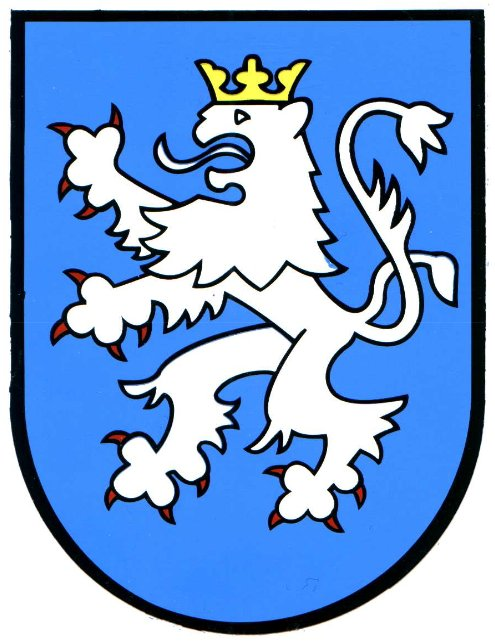 Das Stadtwappen der thüringischen Stadt Blankenhain: Das Wappen zeigt auf blauem Grund einen rotbewehrten und bezungten silbernen Löwen.